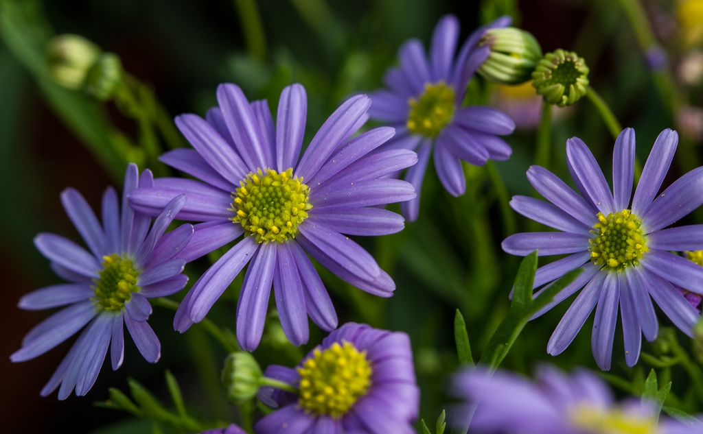 Sachsen: Zierpflanze